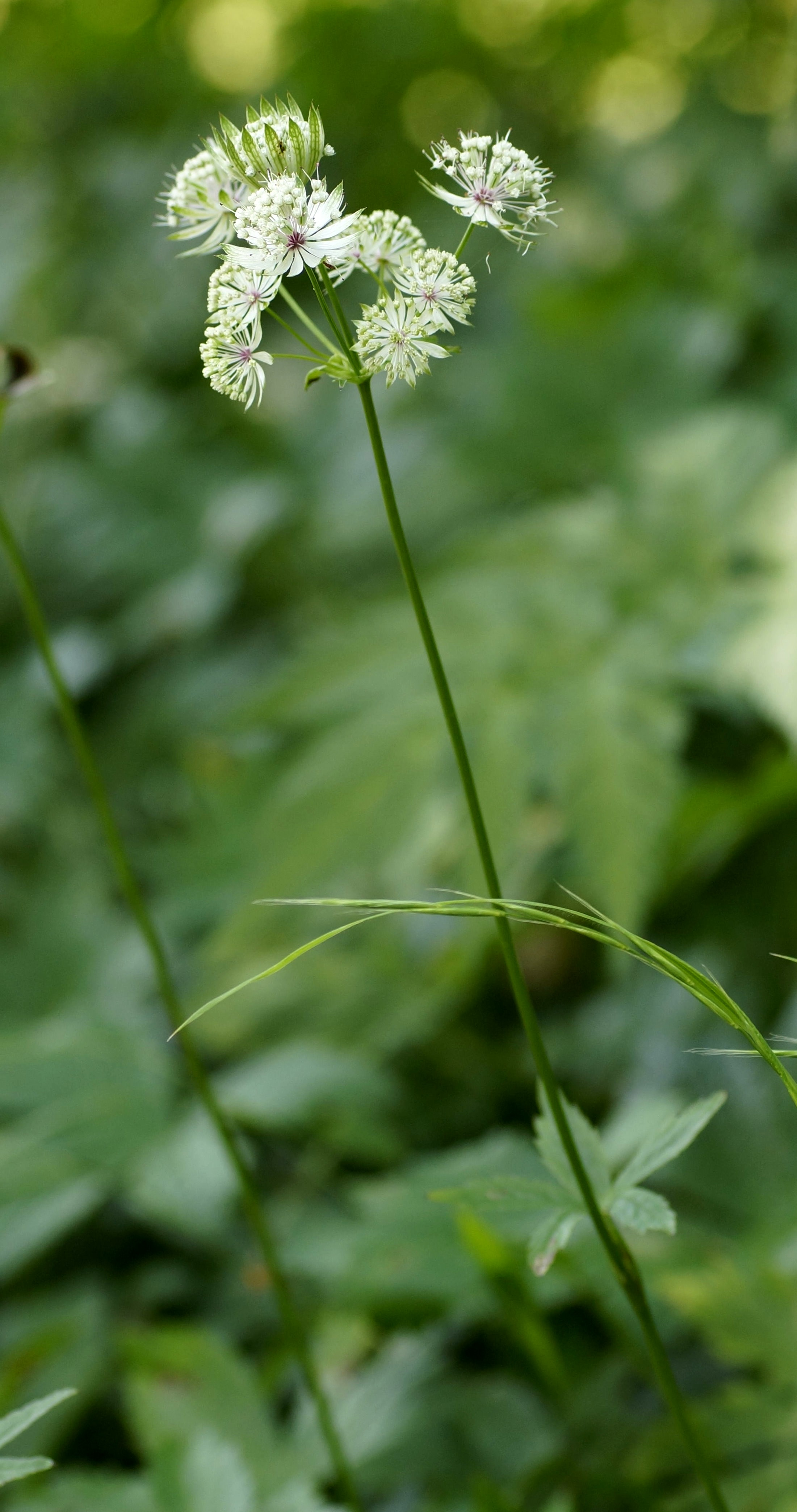 Apiaceae, Große Sterndolde Deutschland, Oberstdorf, Trettachtal, 900 m Photo: U.Schmidt, 20.VII.2013